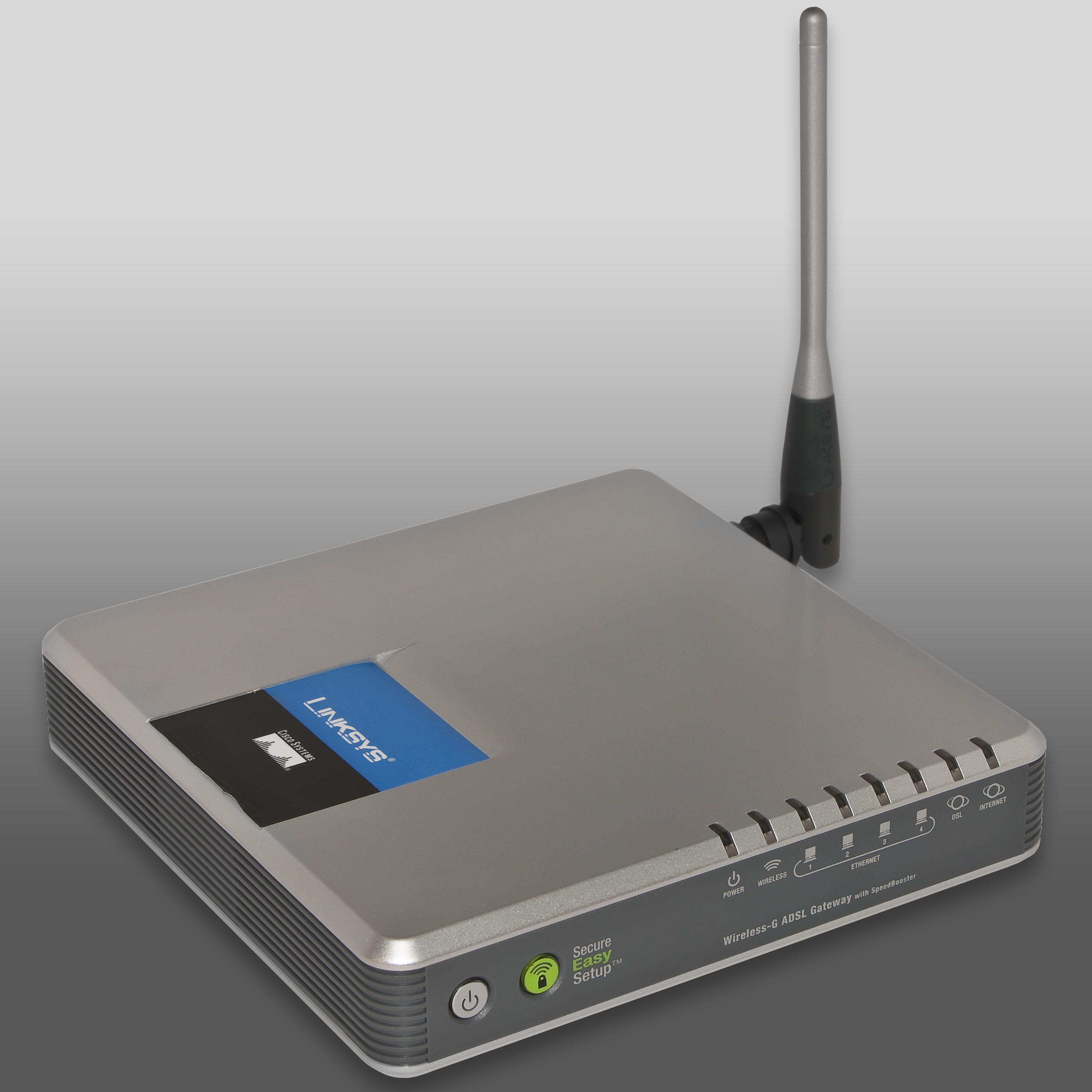 Linksys WAG54GS ADSL2+ Modem Router